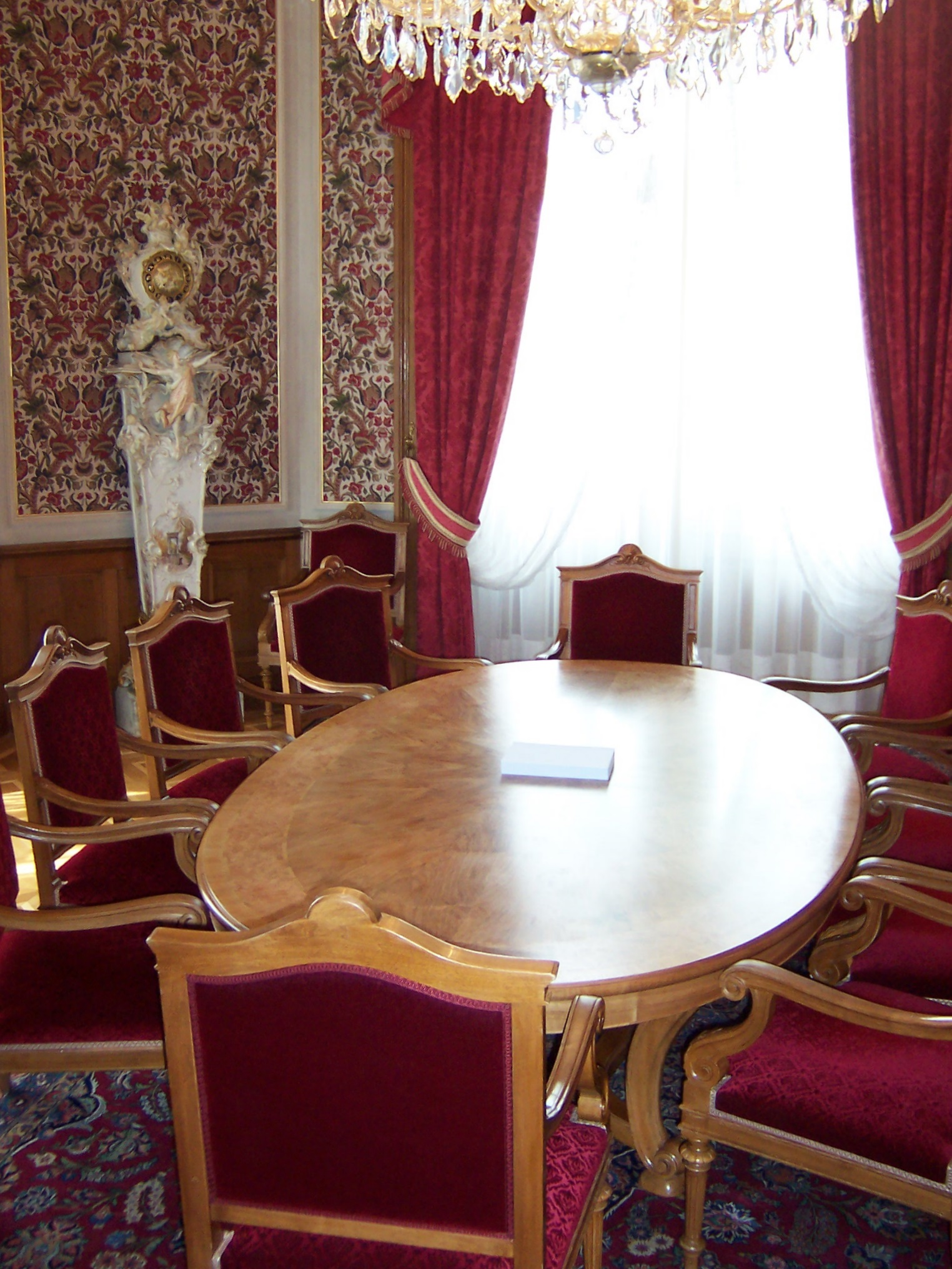 Repräsentationszimmer des Schweizerischen Bundesrates neben dem Nationalratssaal des Bundeshauses in Bern.